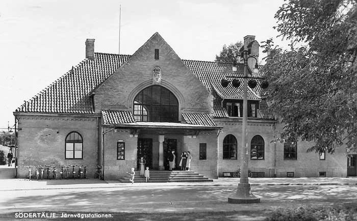 Stationsbyggnad Järnvägsstationen Södertälje